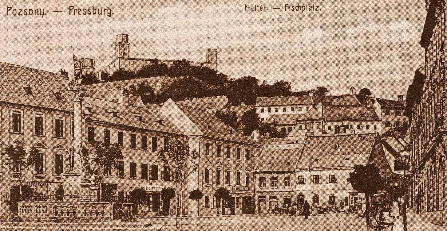 Der Platz wurde im Zuge einer neuen Donaubrücke aufgegeben. Nahezu alle Häuser abgerissen.